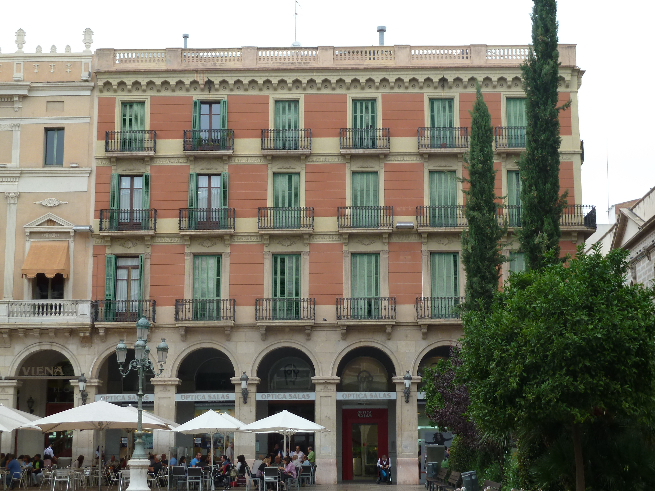 Reus